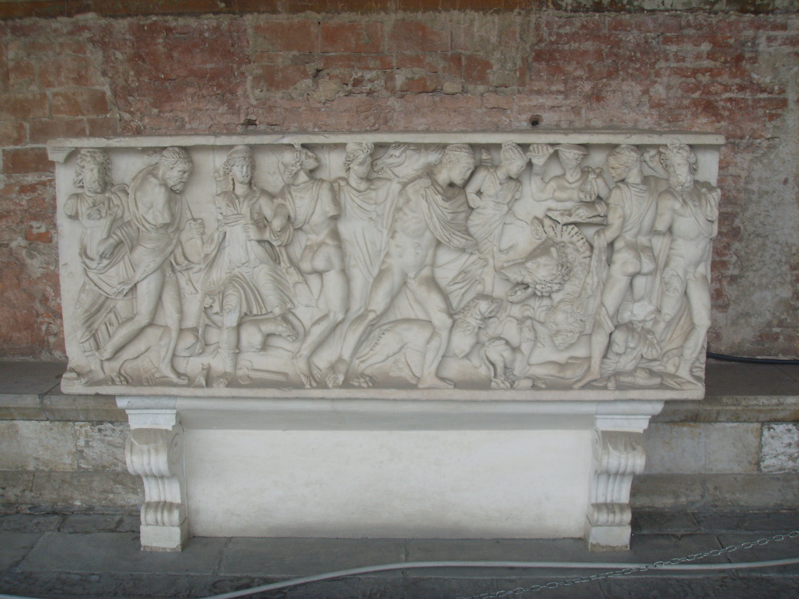 Camposanto Monumentale (monumental graveyard) Roman age sarcophagus. In Pisa, Italy.